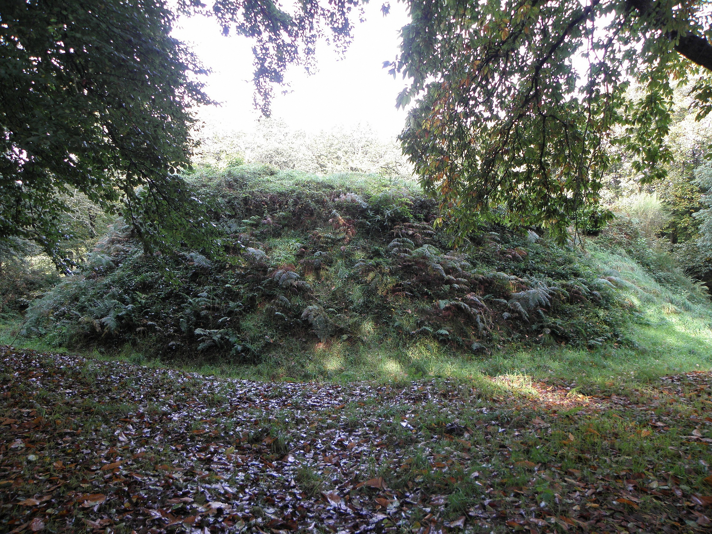 Motte castrale de Lesquélen en Plabennec (29), sa première douve et son glacis vus du sud-est.